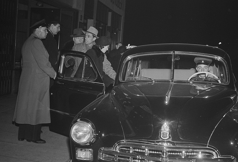 Original image description from the Deutsche FotothekAnkunft der sowjetischen Baletttänzer Jurij Kondratow und Maja Plissezkaja sowie des Bassisten M.D. Michailow vor dem Capitol